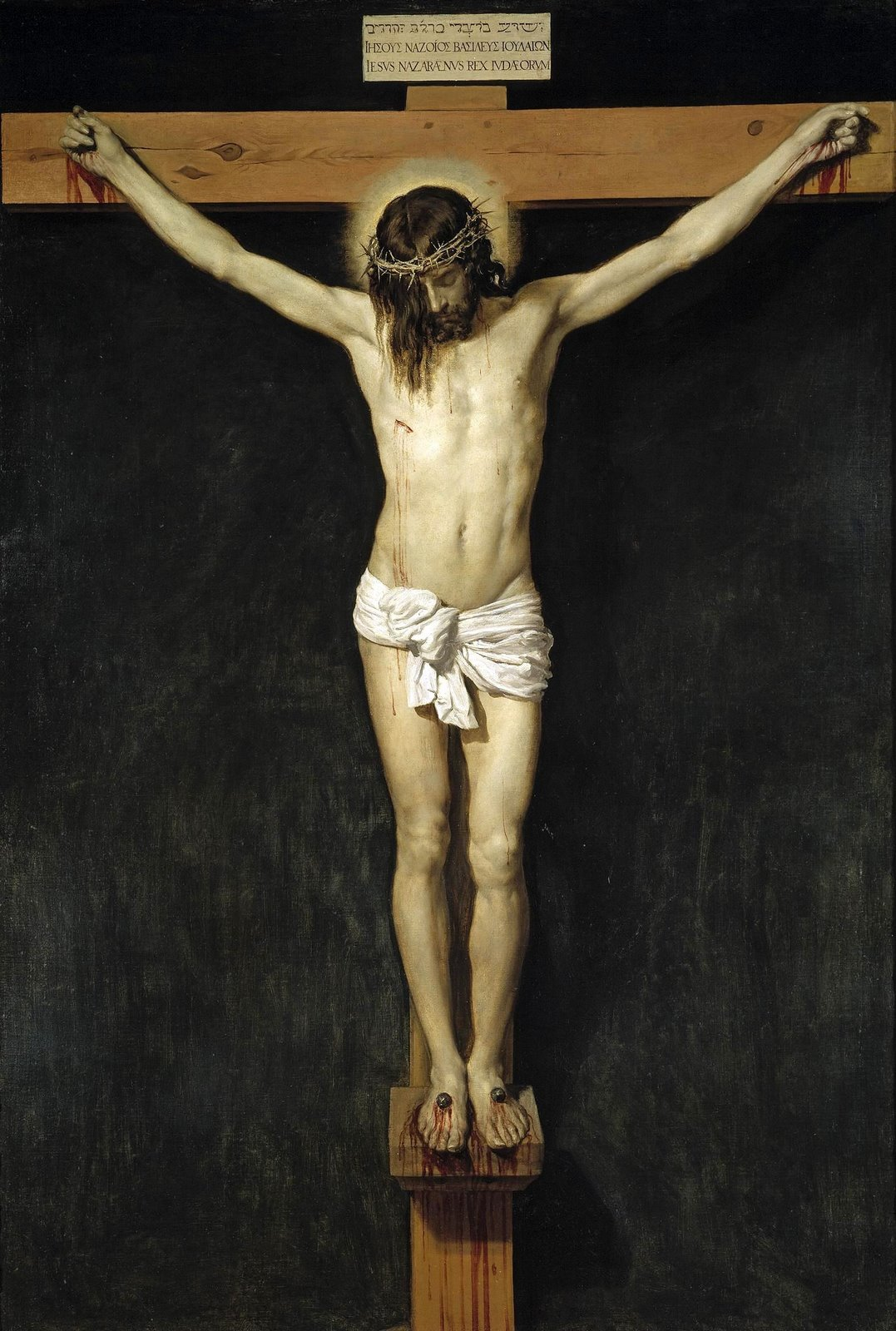 La obra representa a Jesucristo crucificado, y es una de las obras religiosas más conocidas del pintor sevillano Diego Velázquez.